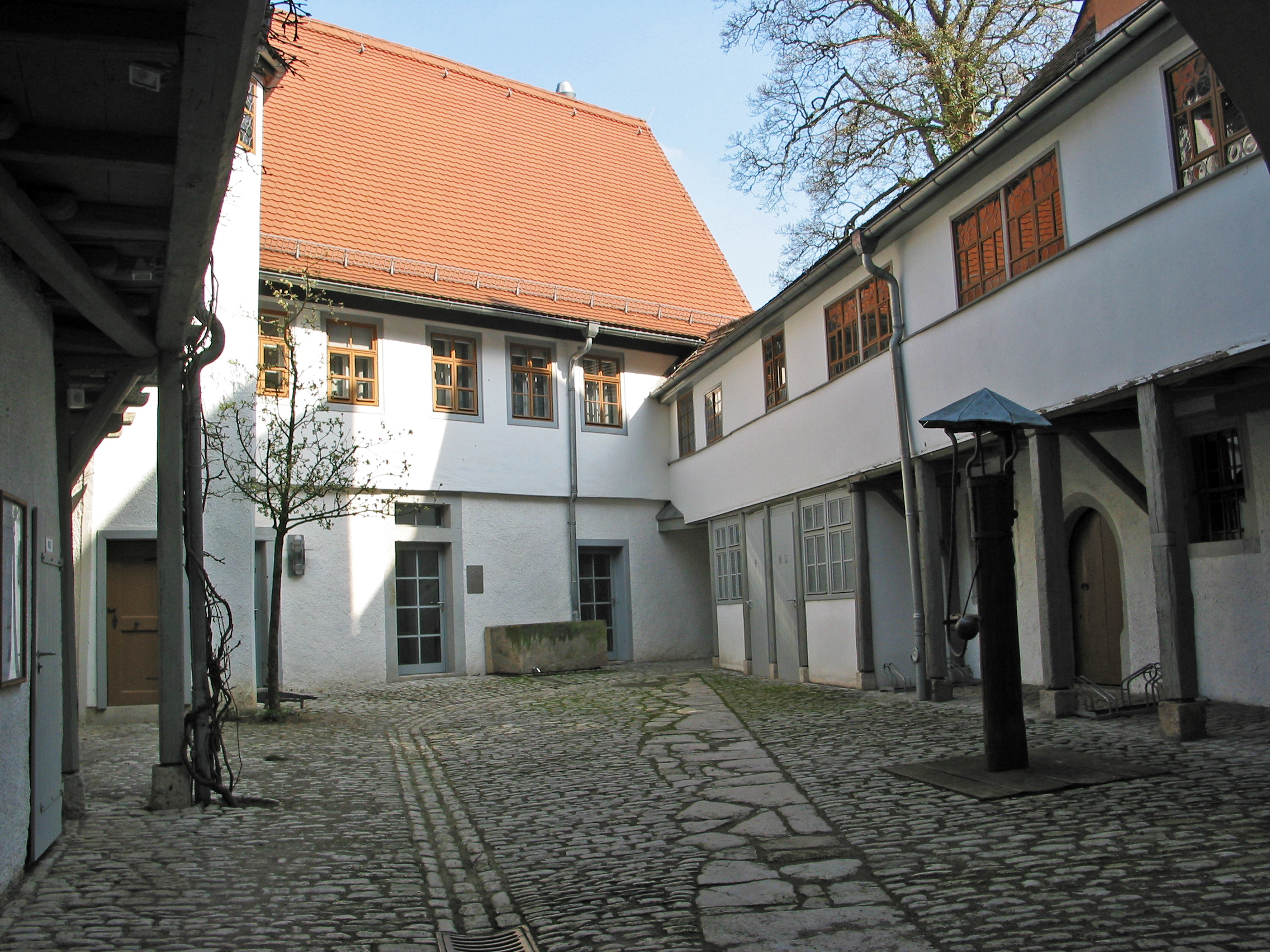 Geschlossener Innenhof des Kirms-Krackow-Hauses in Weimar, eines der ältesten erhaltenen Bürgerhäuser der Stadt. Es ist Zeugnis der damaligen bürgerlichen Wohnkultur und gilt als Architekturdenkmal. 1701 kam das Anwesen in den Besitz der Familie Kirms. Heute ist es als Museum öffentlich zugänglich.